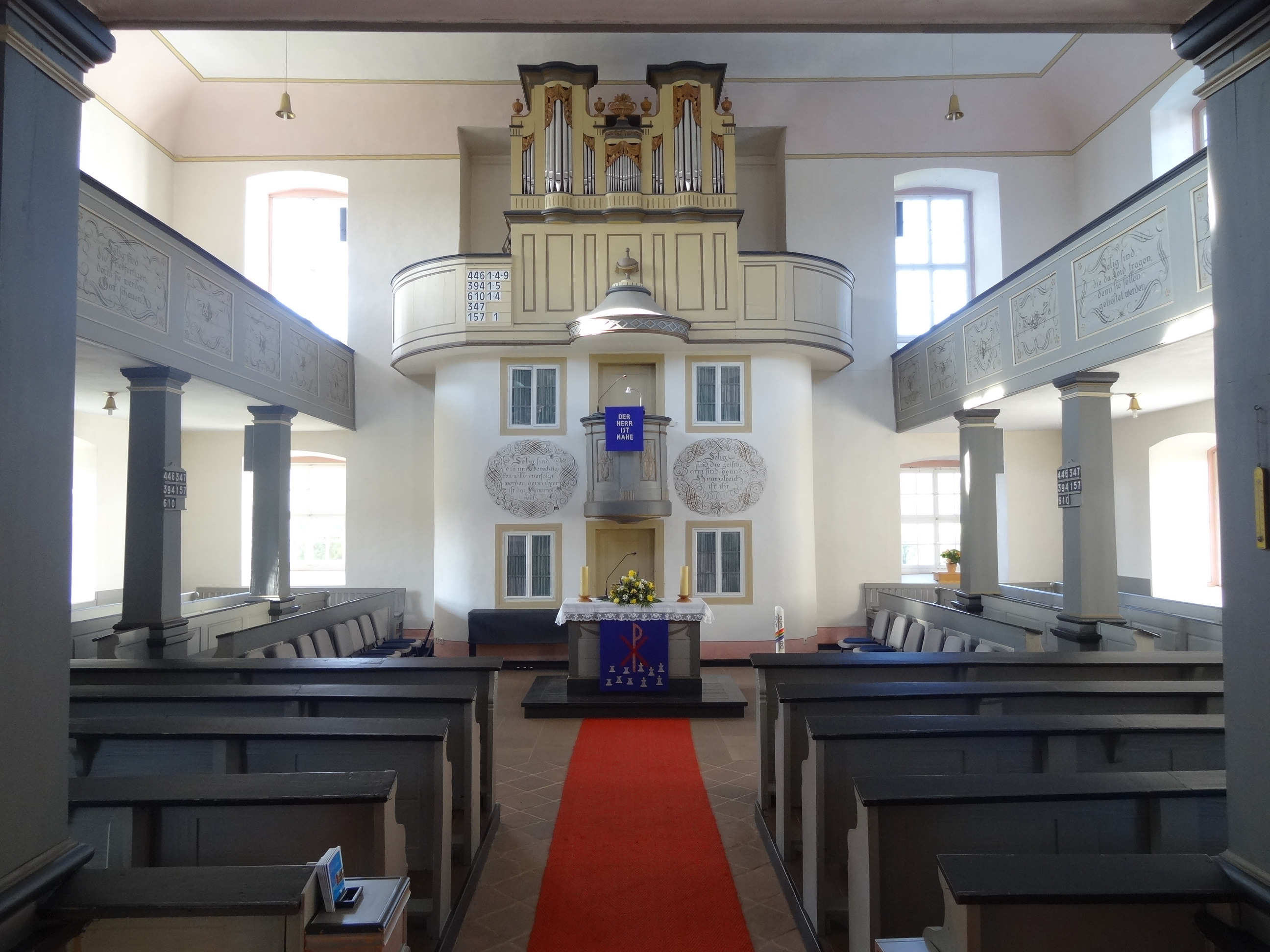 Evangelische Kirche Birklar